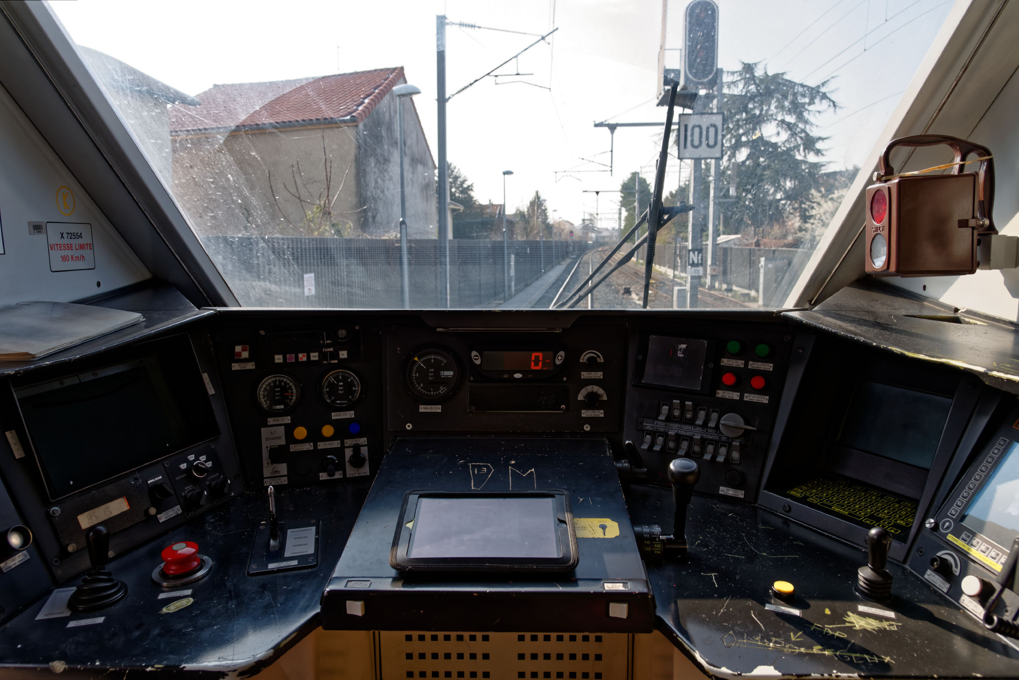 Cabine de conduite d'un X 72500 en gare de Romans - Bourg de Péage.